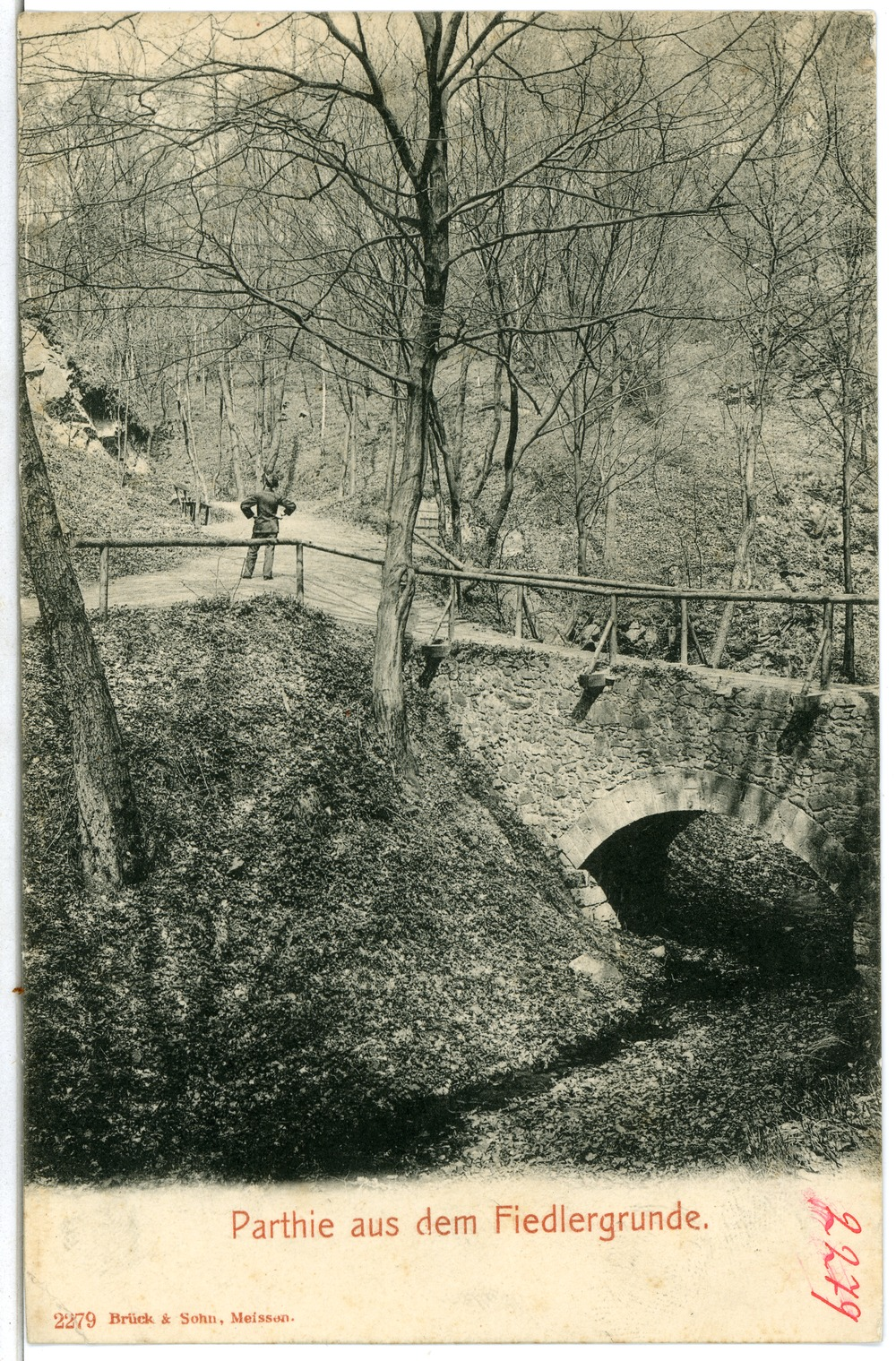 Oberlößnitz; Partie aus dem Fiedlergrunde This postcard is from publisher Brück & Sohn in Meißen ( postcard has a unique number 02279 and is available in a higher resolution at the publisher. This images was uploaded in a cooperation project between Wikipedians and the publisher.